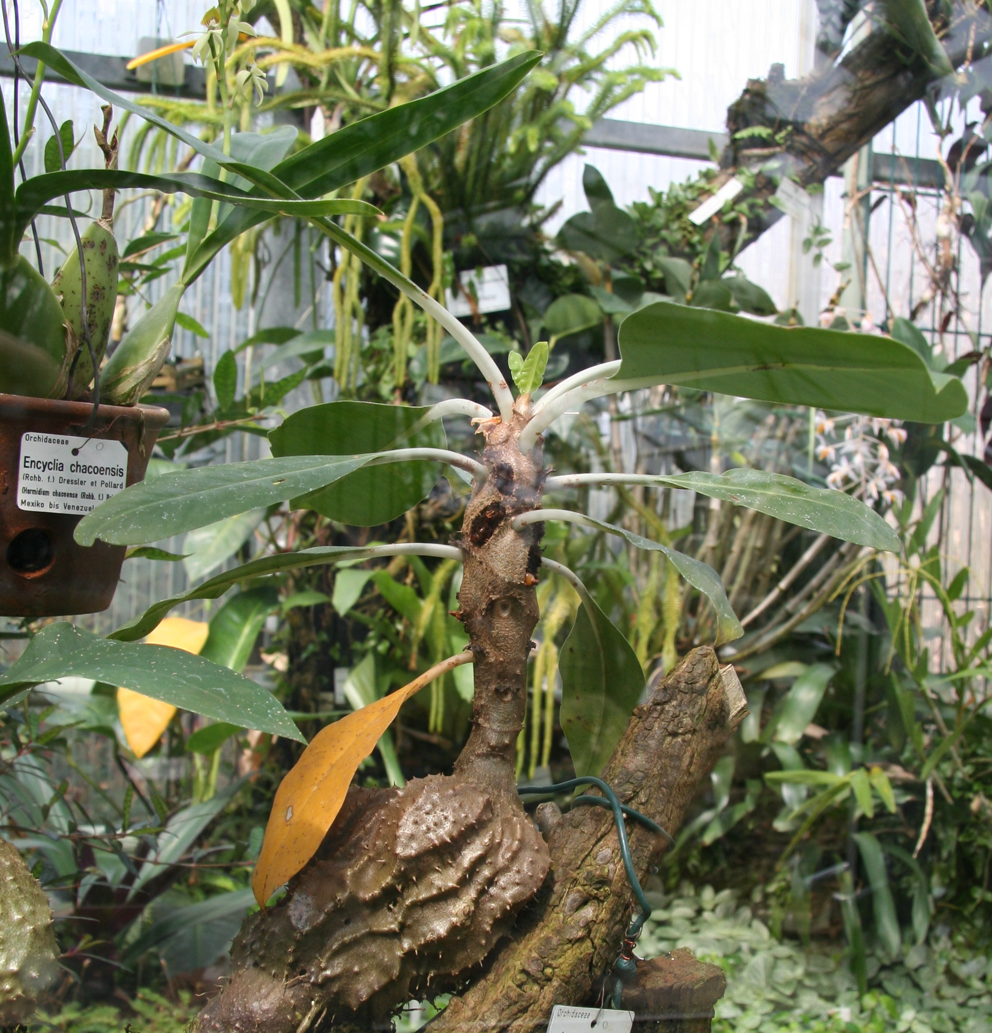 Myrmecodia platytyrea im Botanischen Garten Dresden